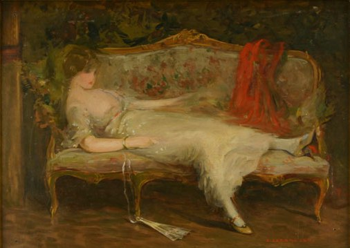 Emilian Lăzărescu - Femeie culcată pe canapea., ulei pe carton, Muzeul Naţional de Artă al României, Bucureşti